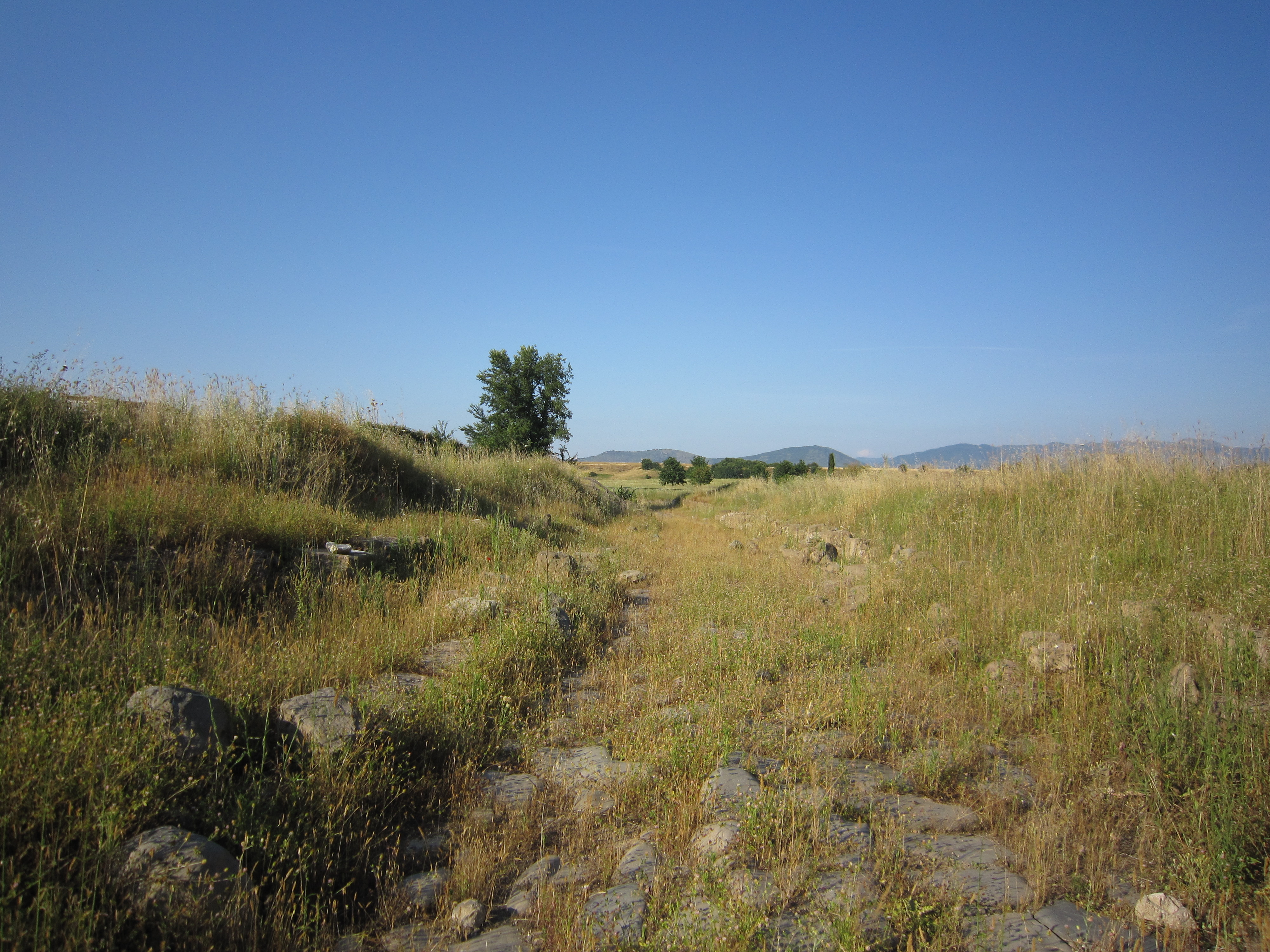 Gabii